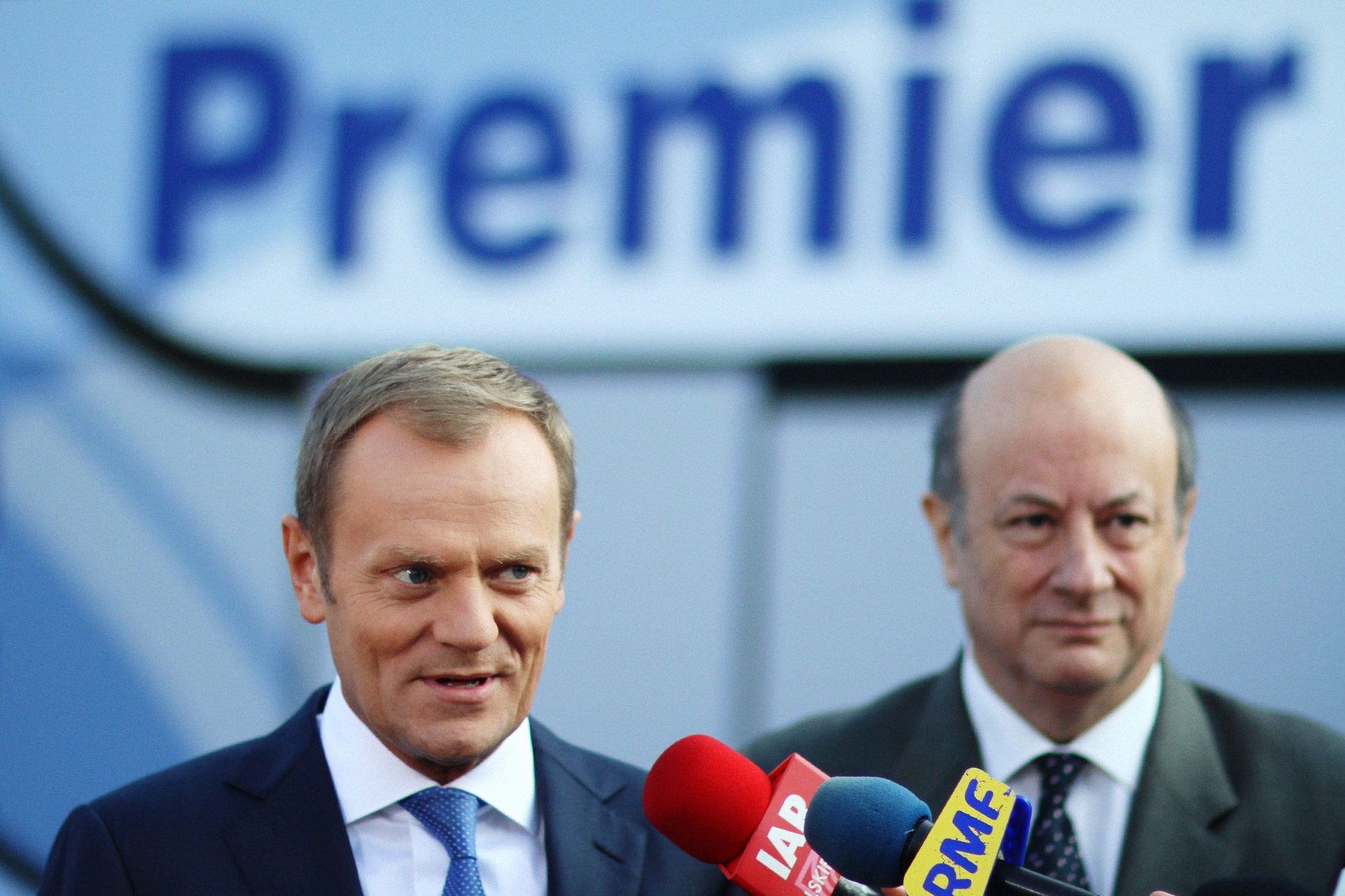 21.09.2011, Premier Donald Tusk oraz Minister Finansów Jacek Rostowski udają się do Wielkopolski, odwiedzą Kutno, Konin, Wrześnię i Poznań